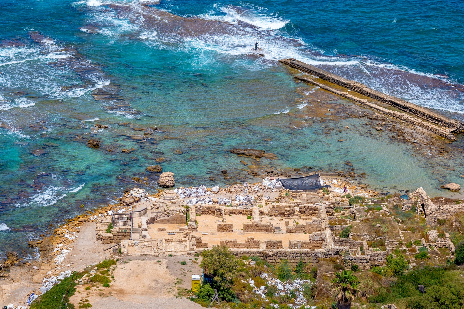 הנמל העתיק שהוקם לפני כ-2,000 שנה על ידי המלך הורדוס. ניתן למצוא בו עוגנים עתיקים, שרידים ועמודי שיש שונים.